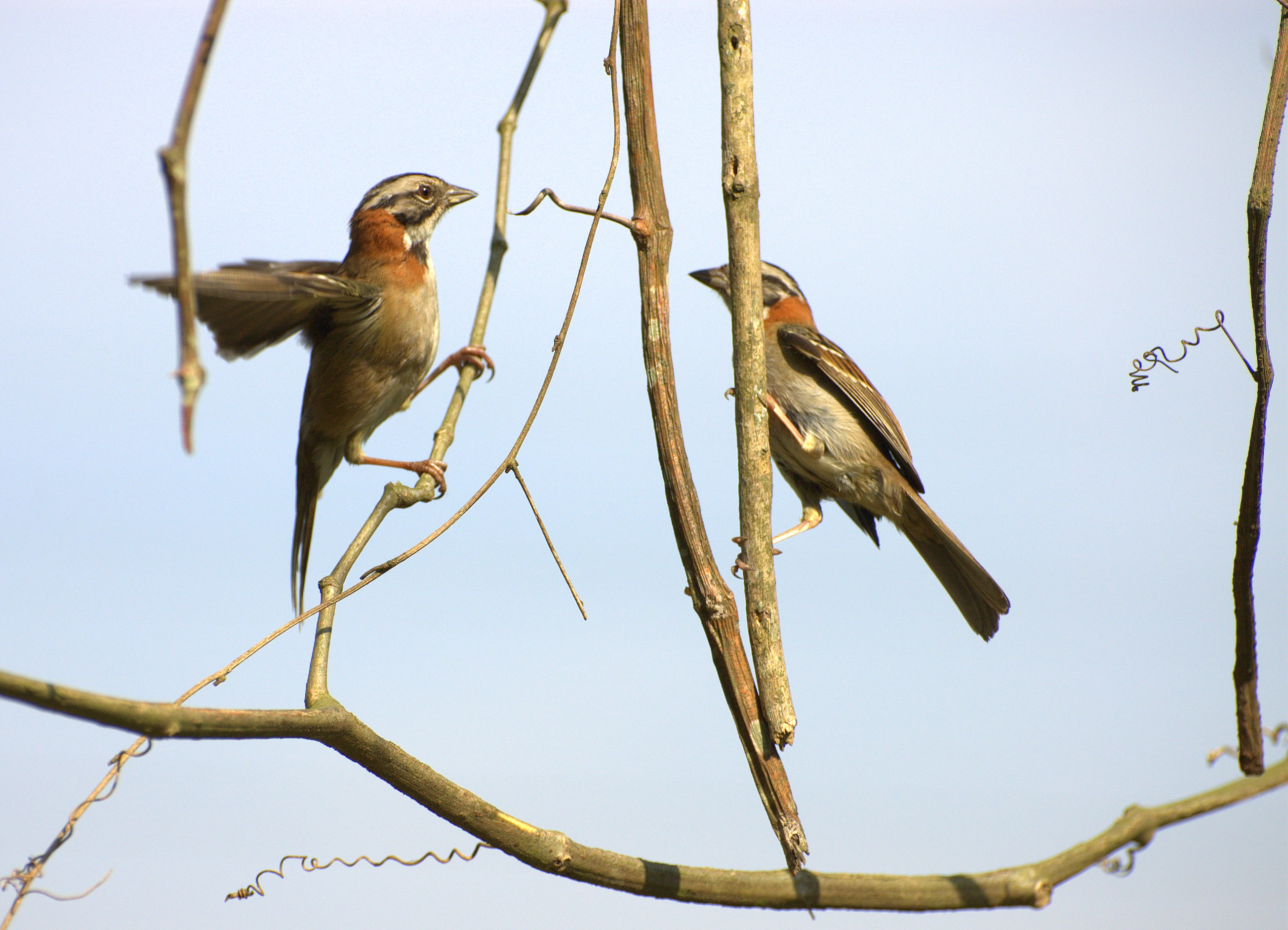 Horto Florestal de São Paulo